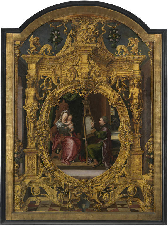 Heilige Lucas schildert de Madonna (Lancelot Blondeel, 1545); collection: Musea Brugge - Groeningemuseum